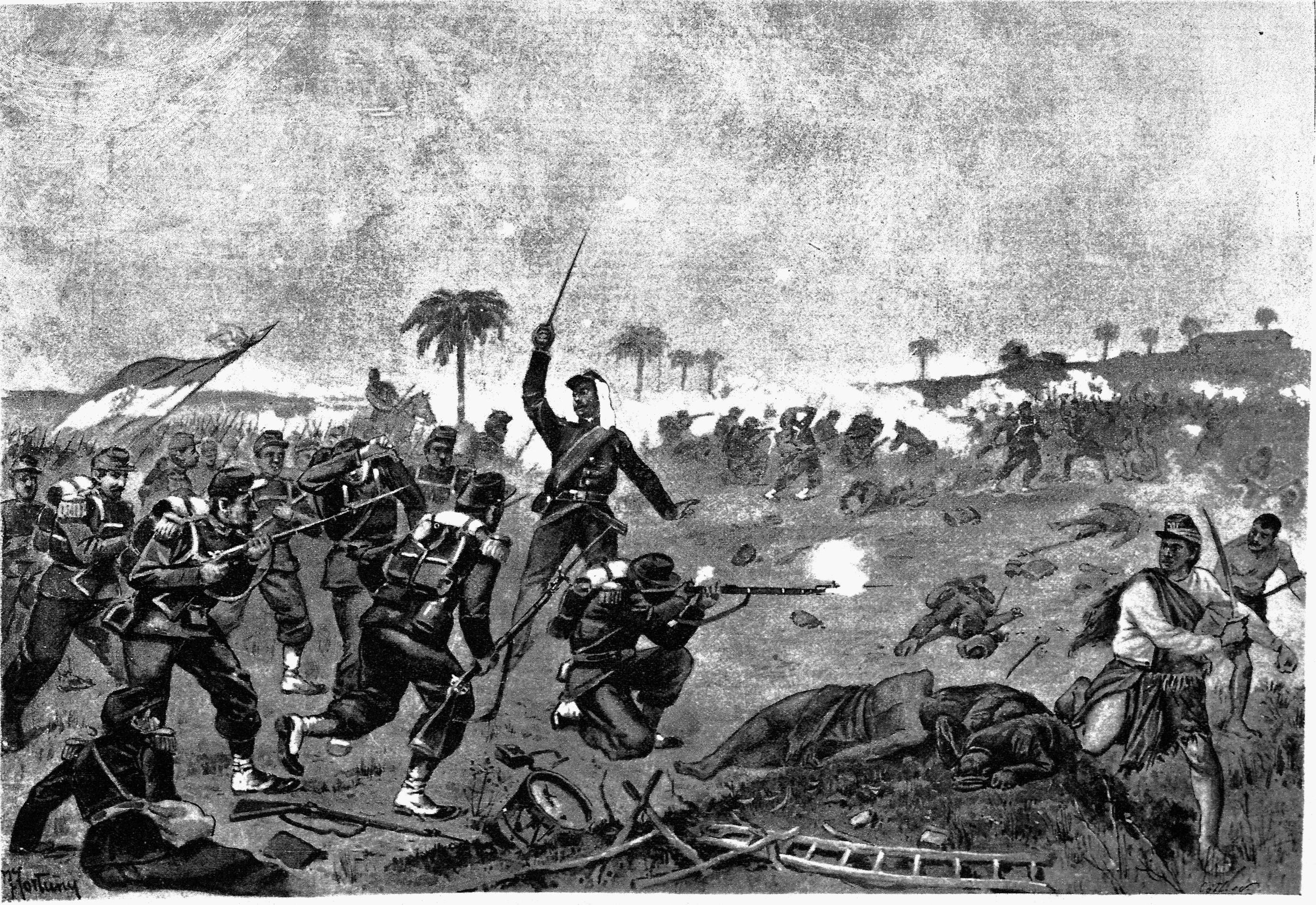 Carga de la infanteria argentina en "Lomas Valentinas".